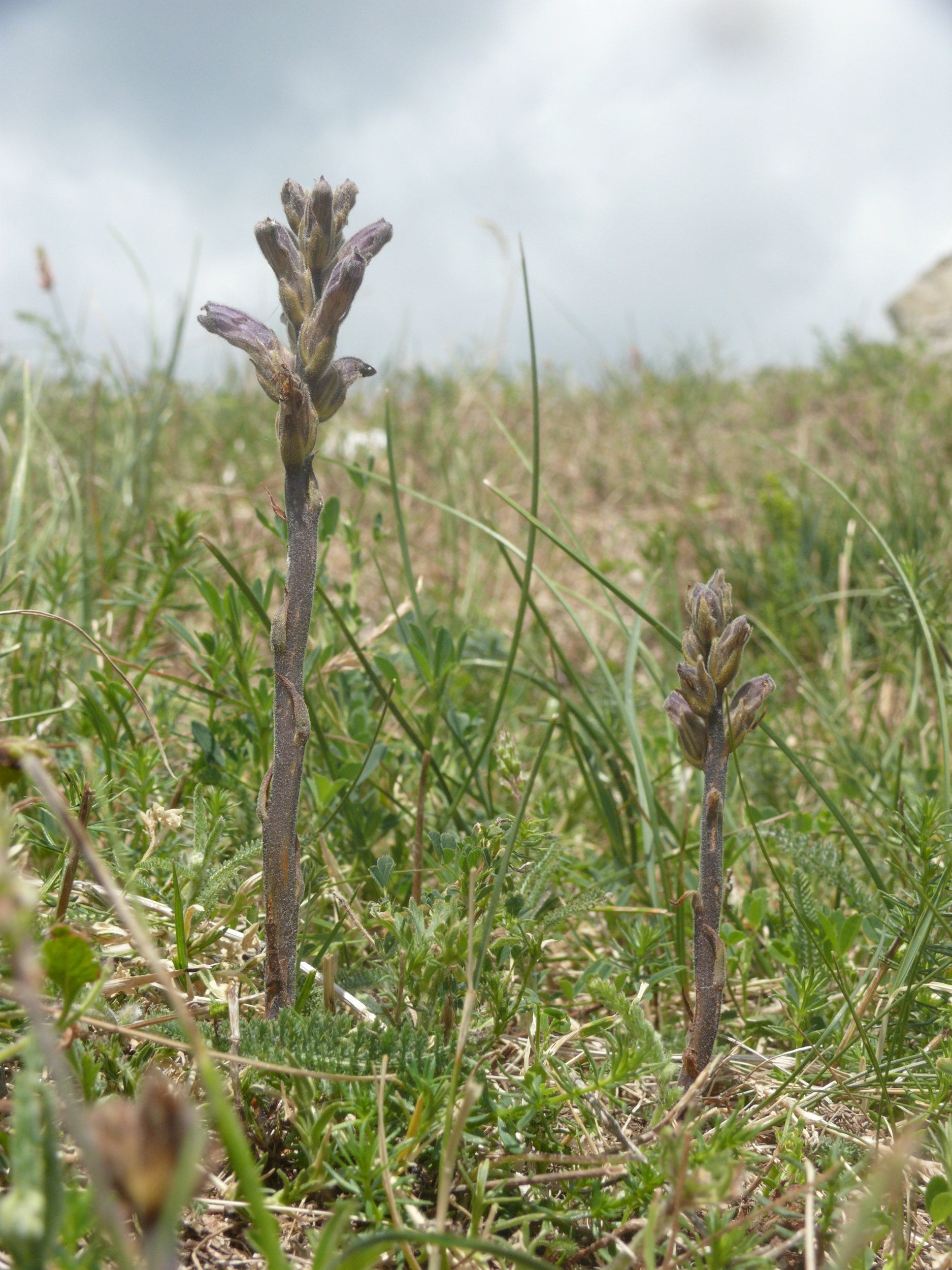 Orobanche purpurea, Nördlinger Ries, Deutschland